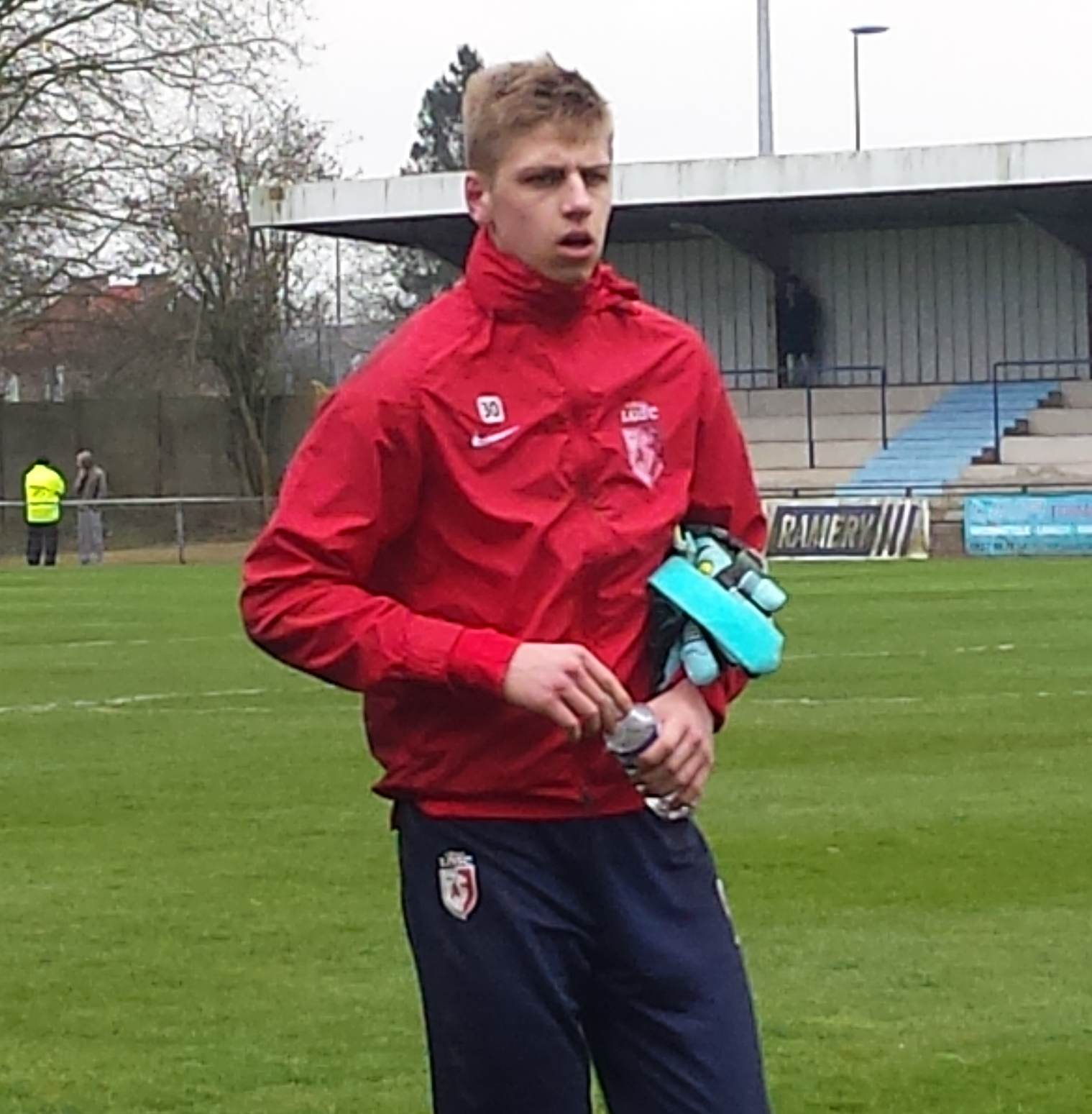 Jean Butez, joueur de la réserve du Lille OSC, avant le match RC Lens B / Lille OSC B, comptant pour la vingt-quatrième journée du championnat de CFA (quatrième division française), le 4 avril 2015 au Stade François-Blin d'Avion.